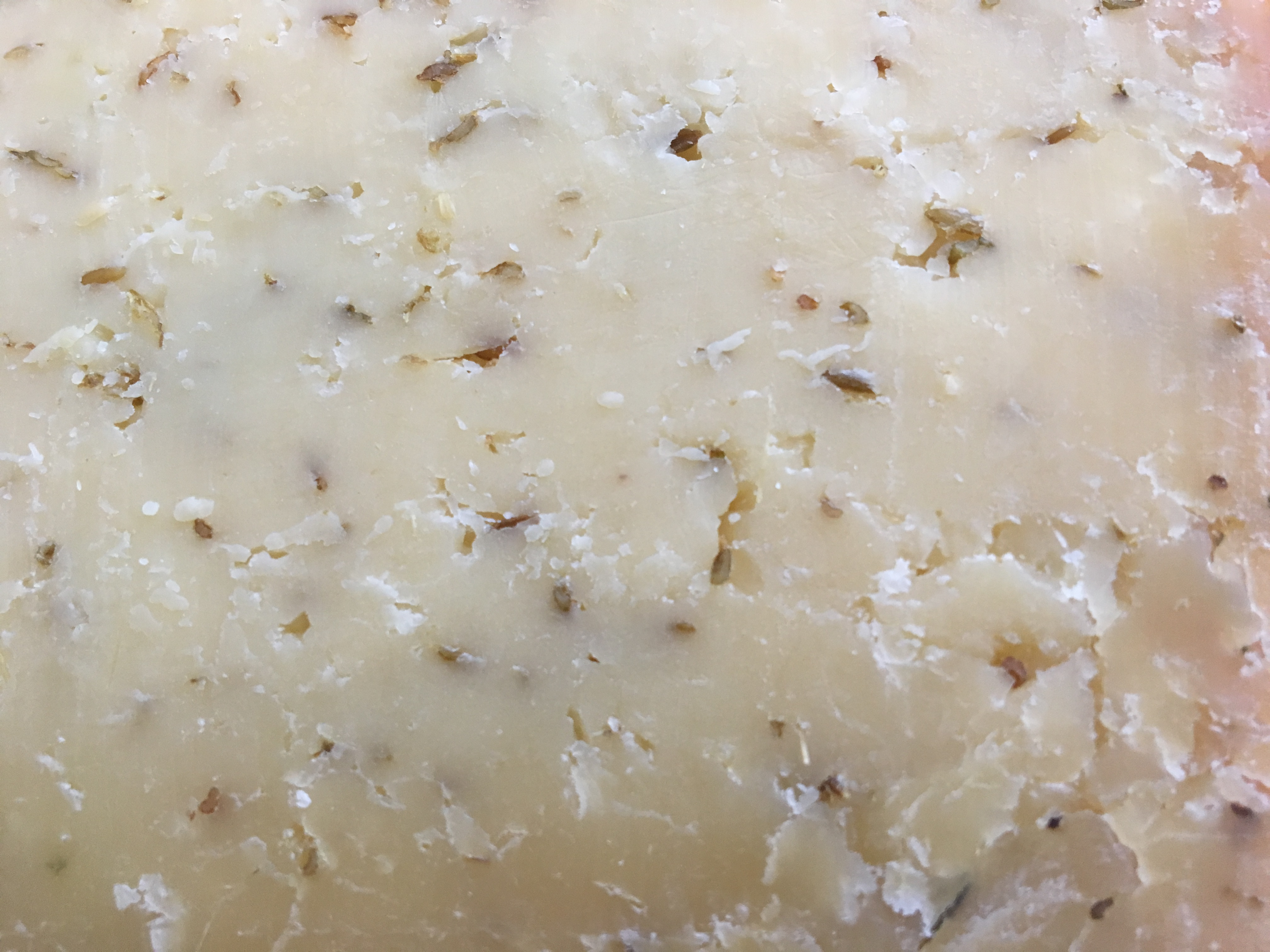 Nederlandse kaas